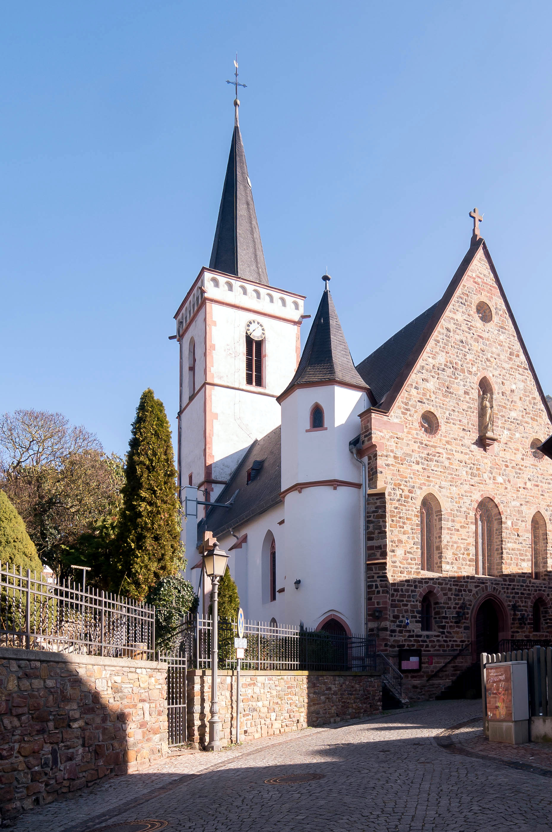 Die spätmittelalterliche katholische Pfarrkirche Heilig Kreuz, Assmannshausen